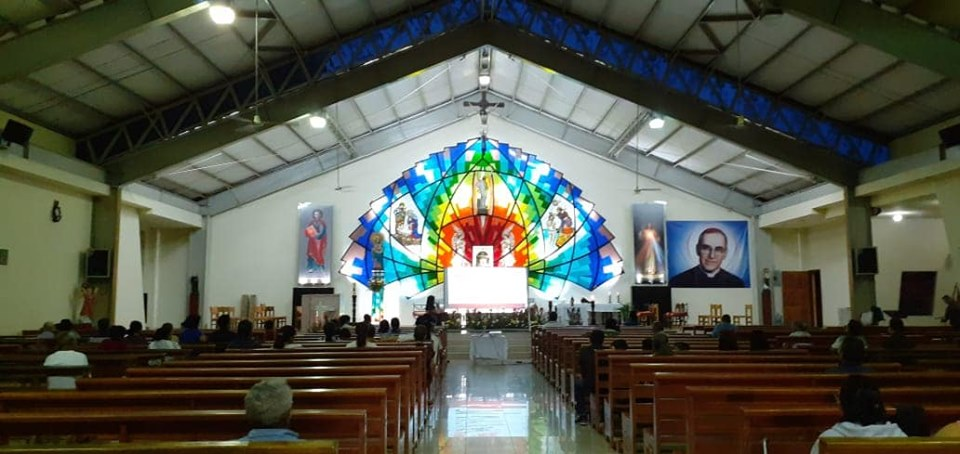 Aquí se muestra una imagen panorámica de la parroquia durante la noche